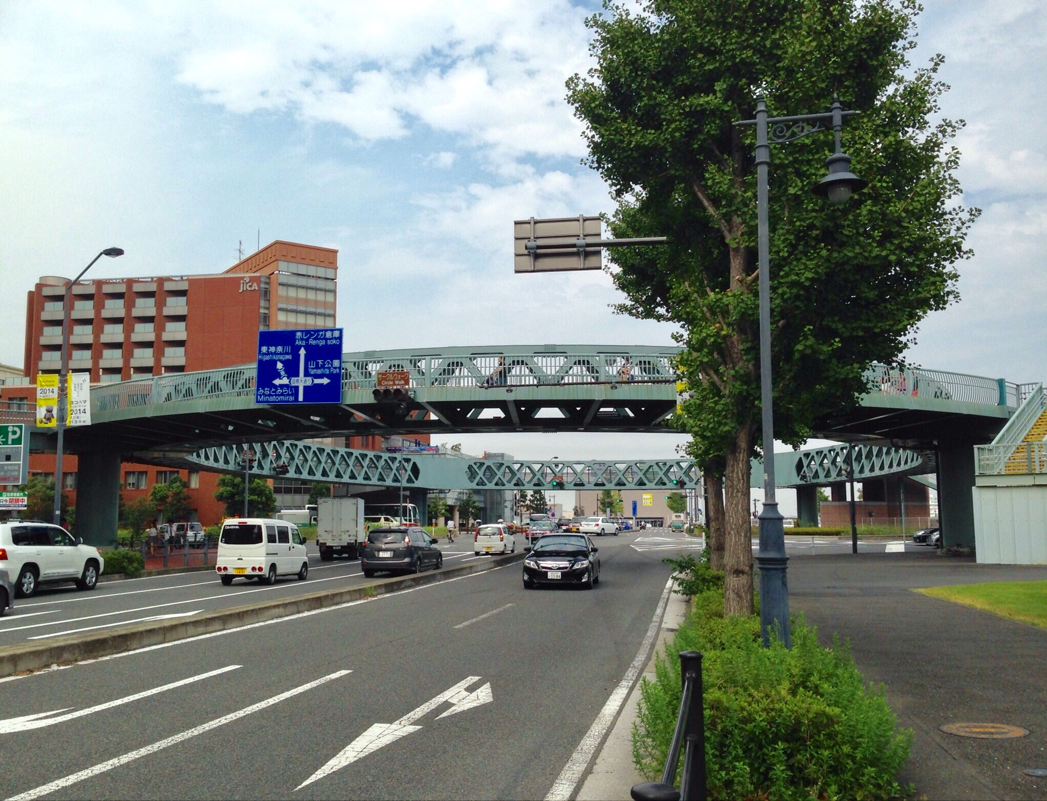 横浜みなとみらい21の新港地区にある円形歩道橋「サークルウォーク」。街の中心部に位置し、国際大通りと万国橋通りが交差する。